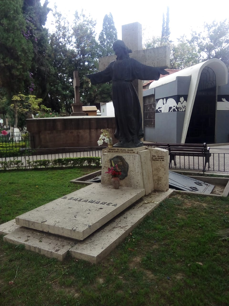 La tumba de Sara U. se encuentra en el cementerio general de Cbba junto a la tumba de su fallecido esposo el presidente Daniel Salamanca